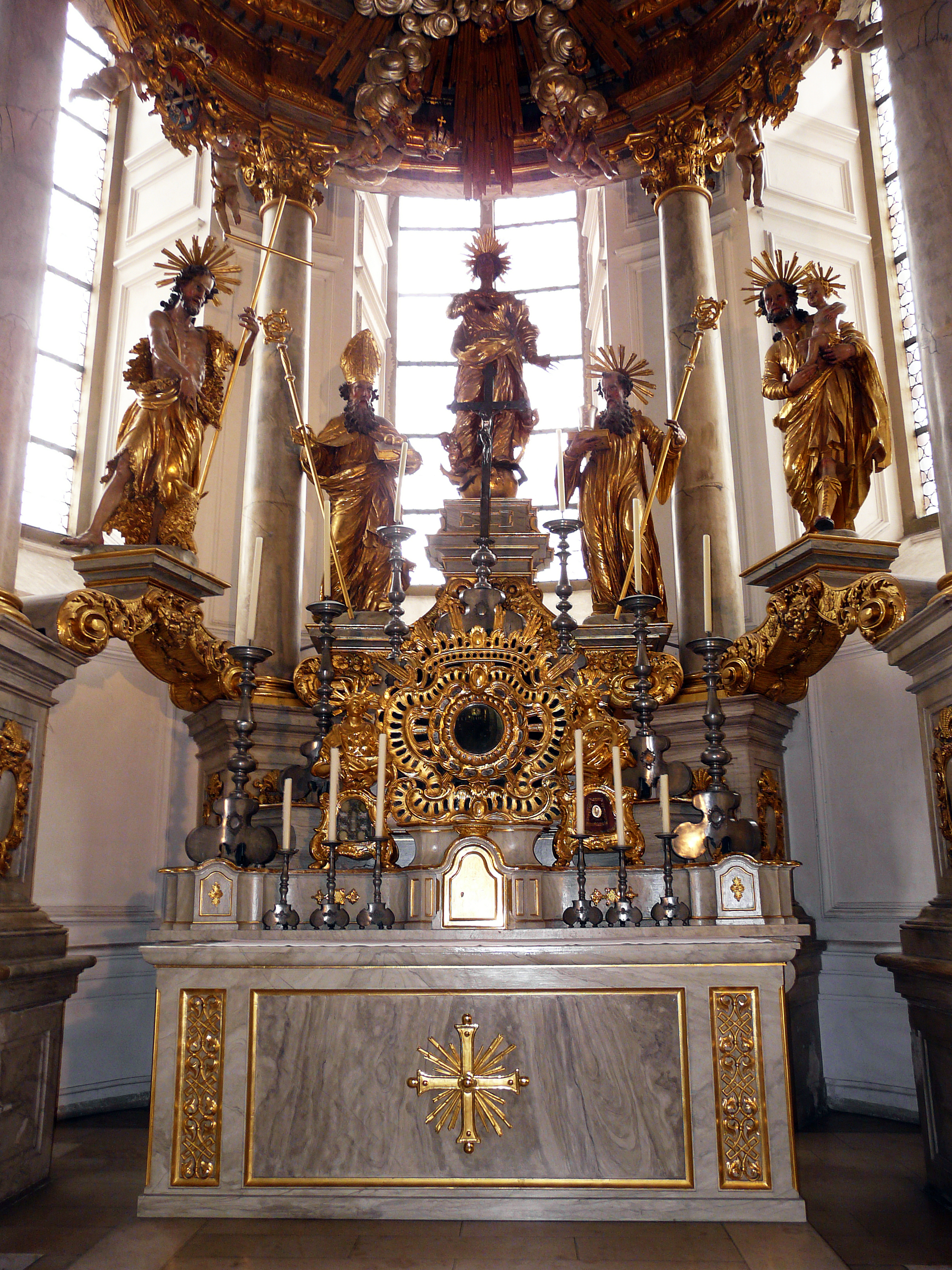 Алтарь церкви Св. Николая